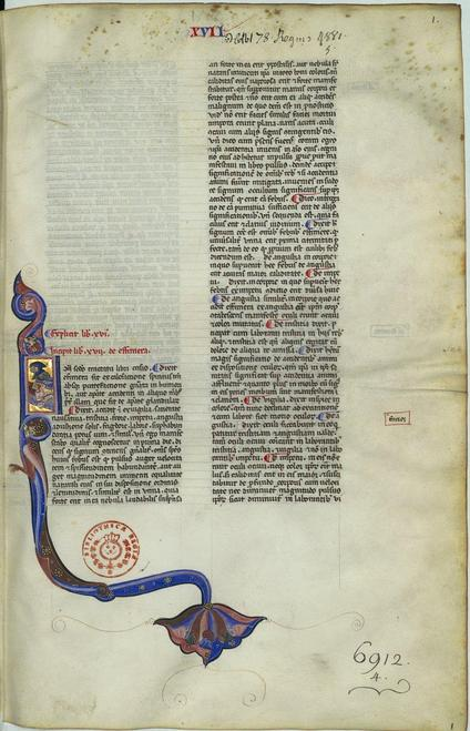 primo folio dell'opera Have seu contenants di Zakaria Razi, conservata alla Biblioteca Nazionale di Parigi